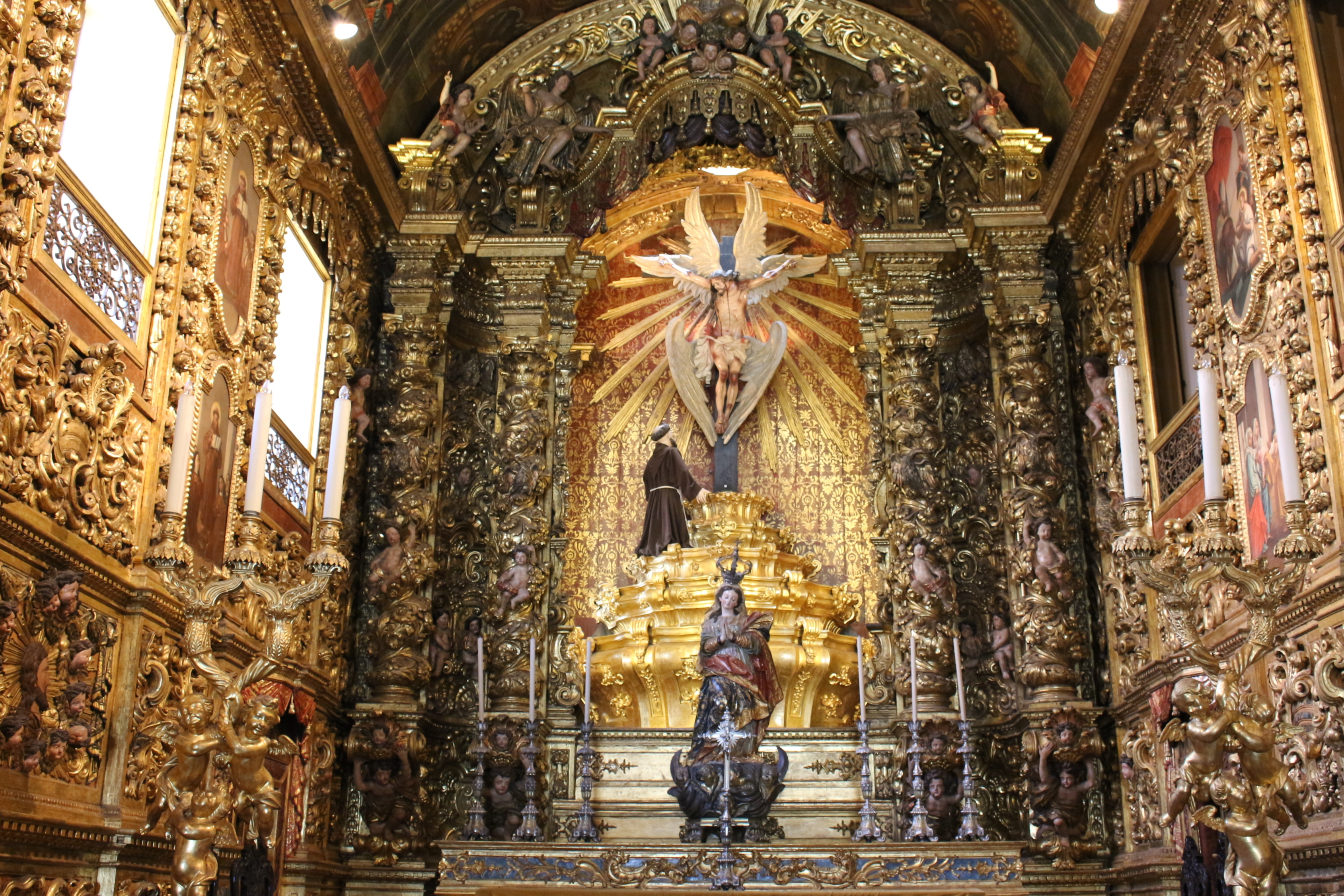 Igreja de São Francisco da Penitência, Cemitério e Museu de Arte Sacra: acervo